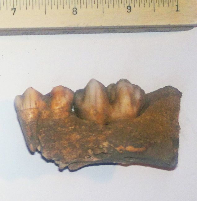 Fragment de la mandíbula inferior d'un caprí, trobat a una cova del paleolític superior.